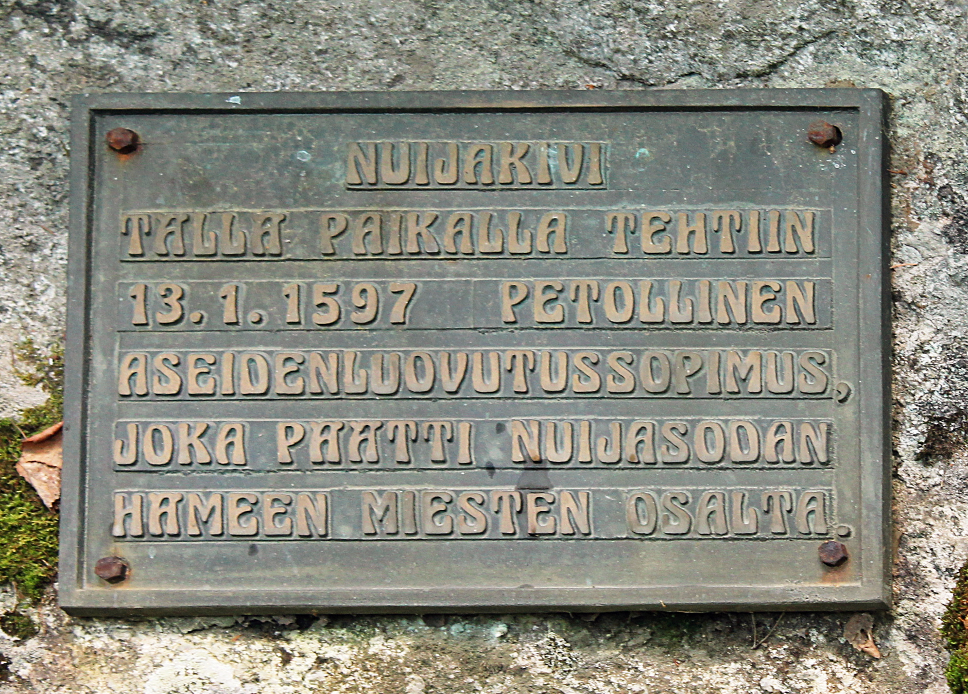 Nuijakivi Nyystölässä.